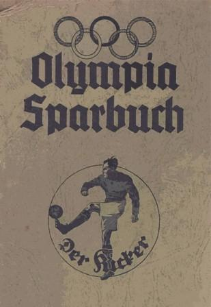 Coverscan